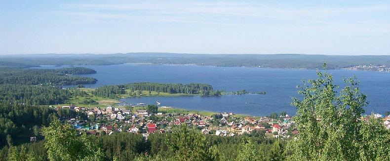 Таватуй - озеро. Урал.